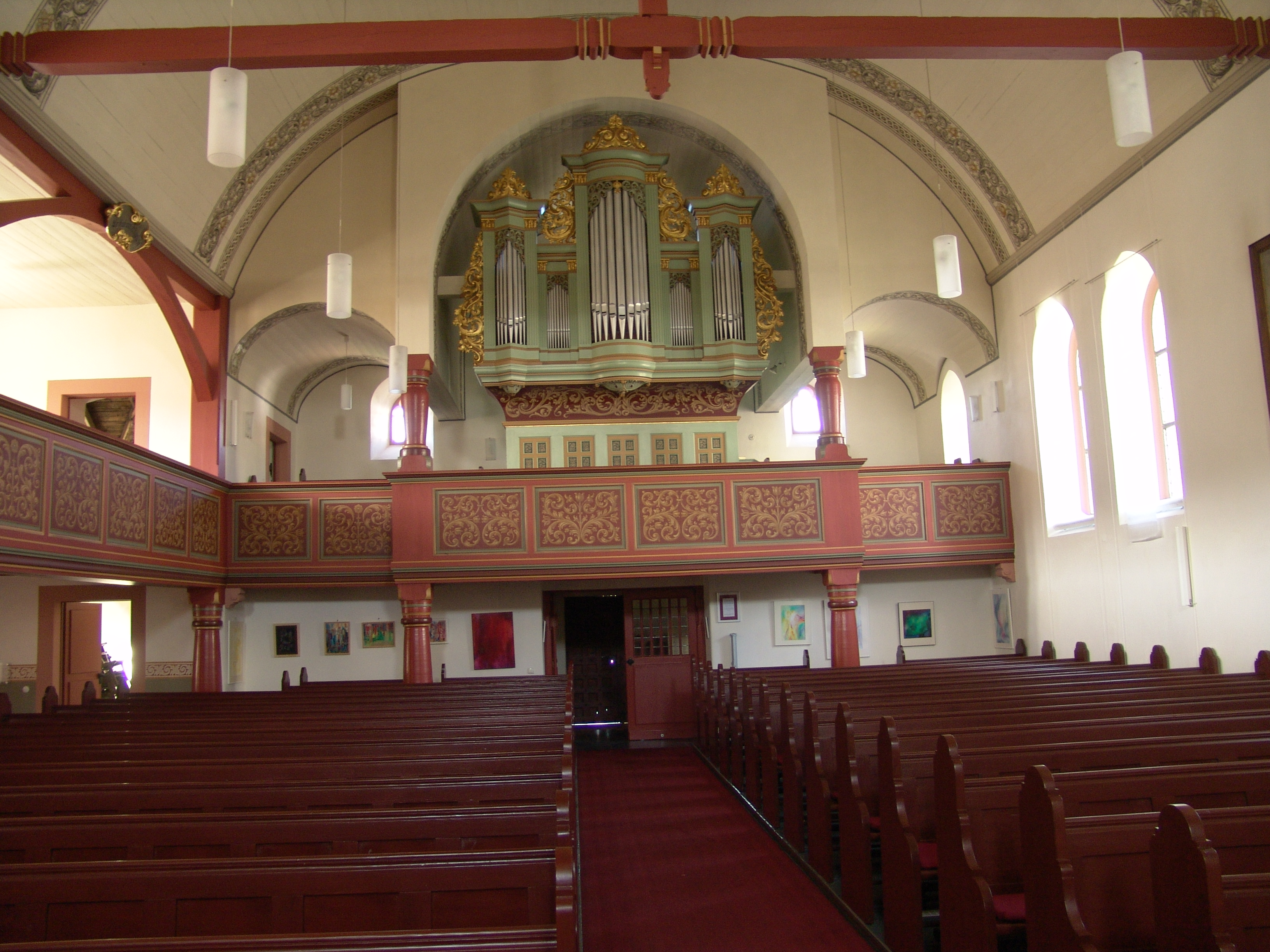 Altengronau Christi-Himmelfahrt-Kirche